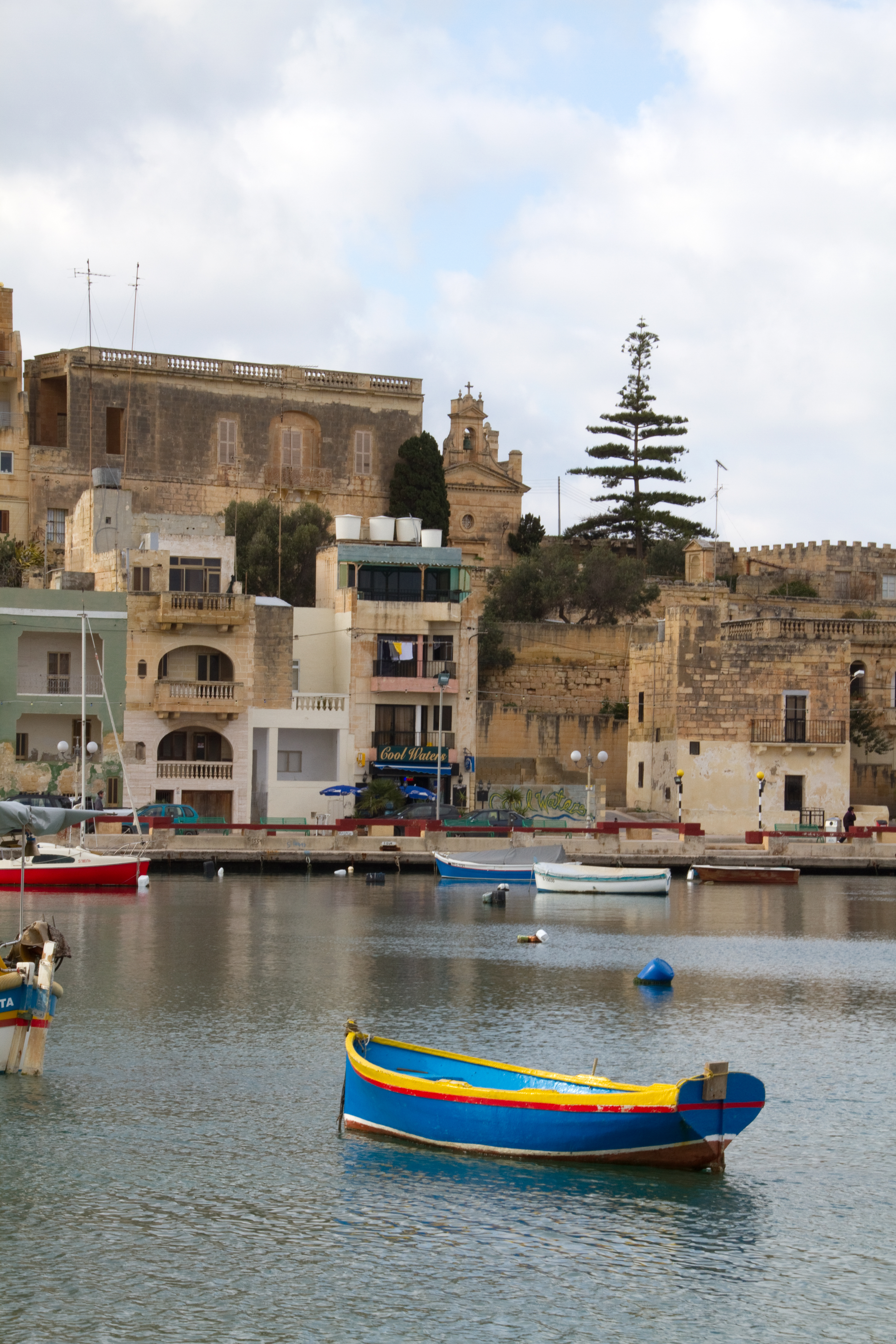 Malta 1